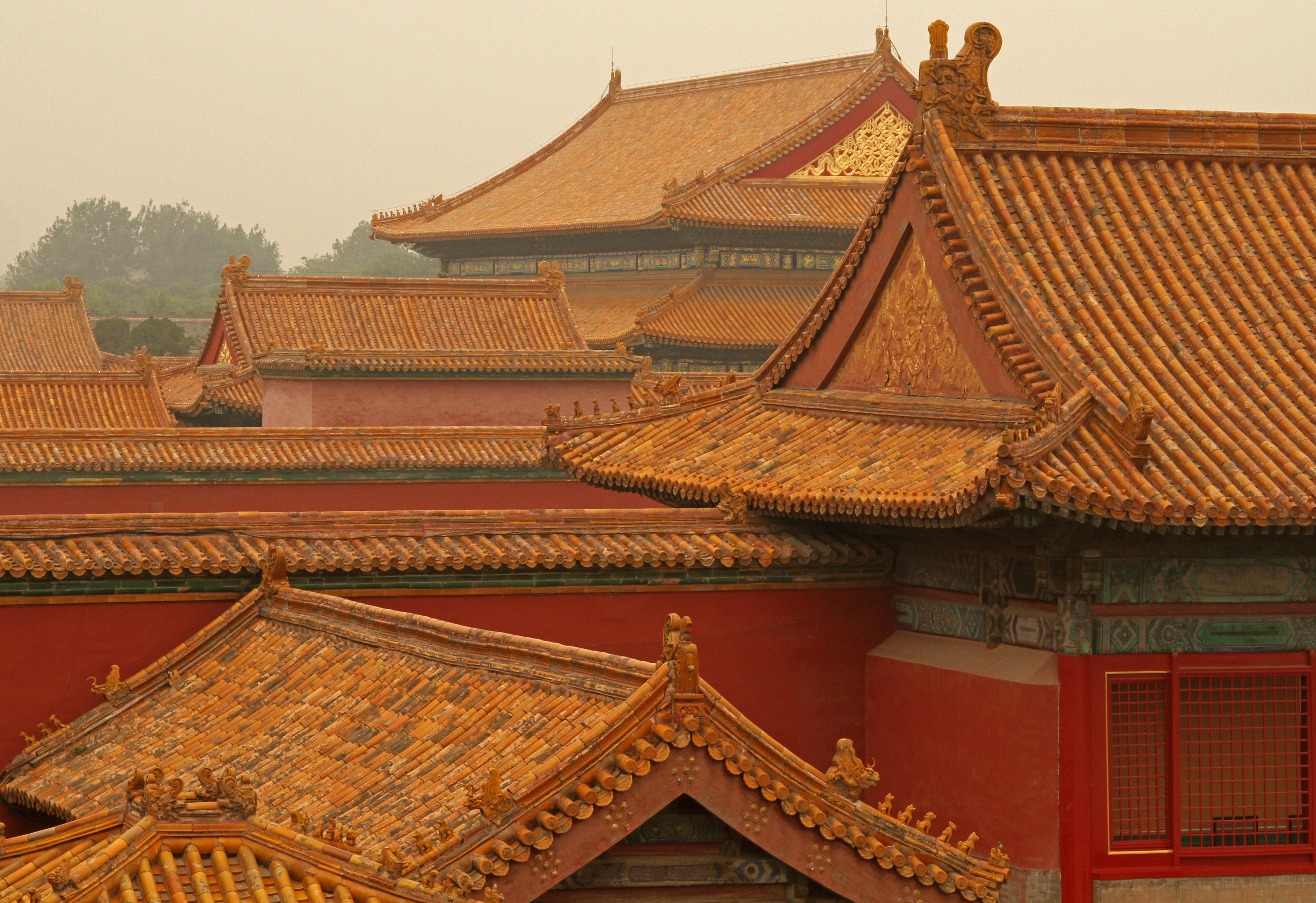 The Forbidden City - Beijing 24 从保和殿后面向西眺望慈宁宫